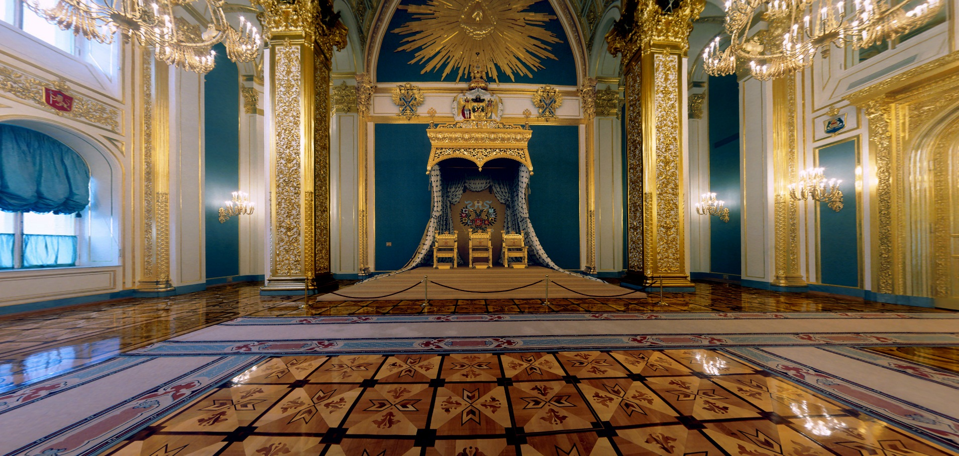 Андреевский зал Большого Кремлёвского дворца Московского Кремля. Трон